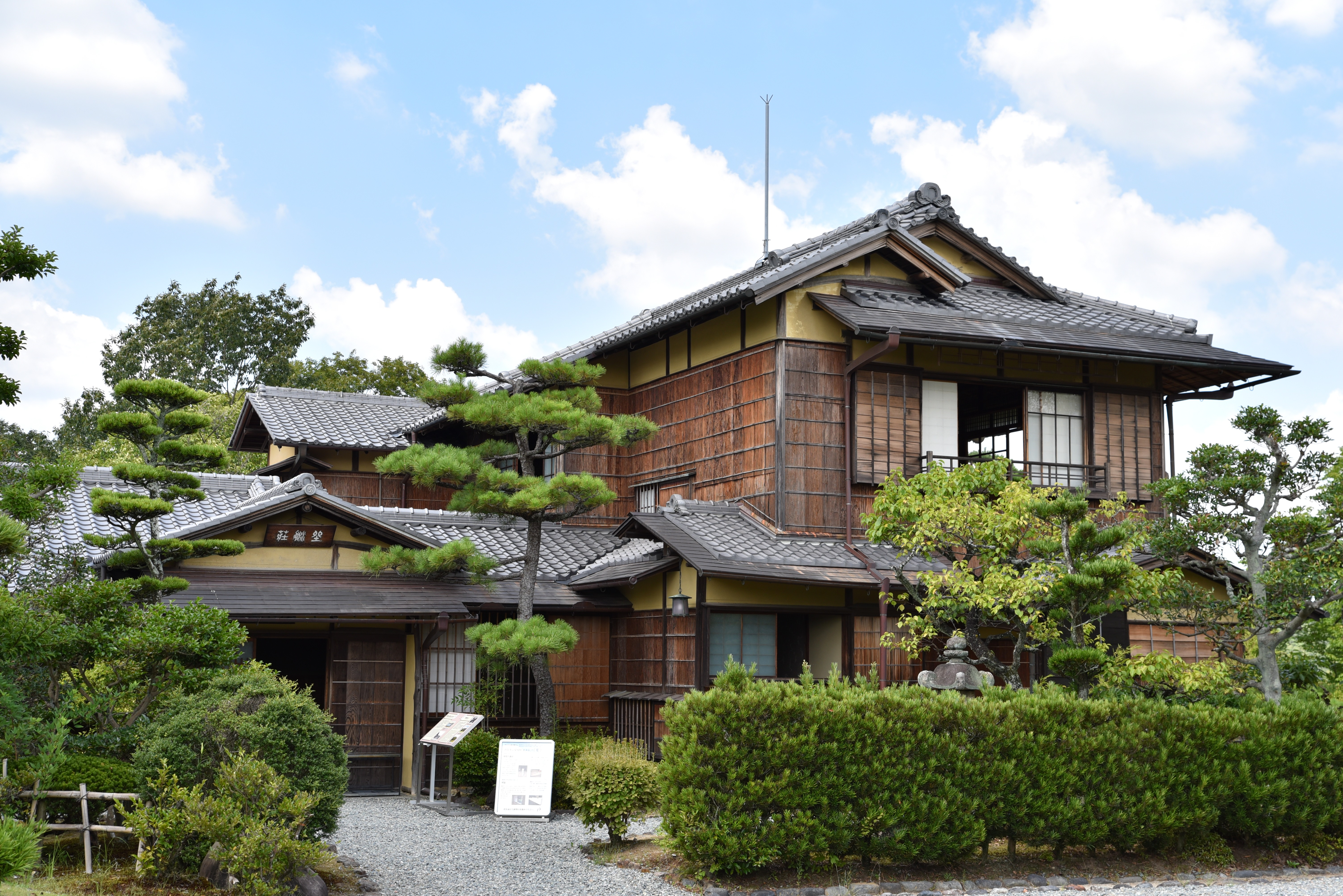 西園寺公望別邸坐漁荘